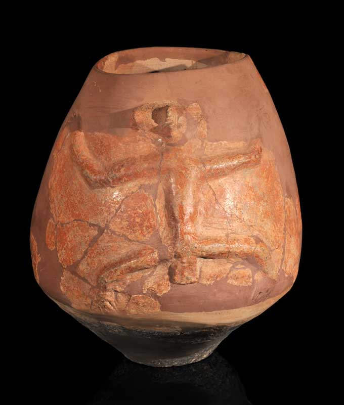 פערור מאתר עין אל-ג'רבה מעוטר בשני צדיו בתבליטים של דמויות אדם רוקדות, שעל פניהן מסכות איל הכלי התגלה על ידי יעקב קפלן בחפירות באתר ב- 1966 הפערור התגלה בשכבות ארכאולוגיות המיוחסות לתרבות ואדי רבה באוסף מוזיאון וילפריד ישראל לאמנות ולידיעת המזרח בקיבוץ הזורע